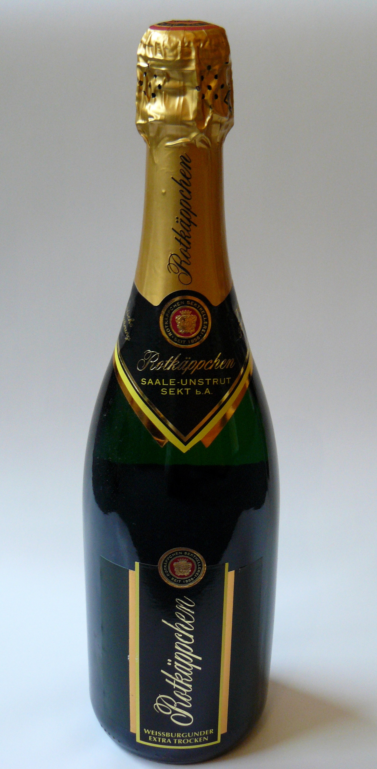 Rotkäppchen Sekt der Sektkellerei Rotkäppchen aus Freyburg (Unstrut). Hier in einer Sonderausführung in klassischer Flaschengärung. Diese Flasche ist am Boden mit einem weißen Punkt gekennzeichnet, was bedeutet das sie in der Sektkellerei noch von Hand gedreht wurde. Sorte: Rotkäppchen Weißburgunder